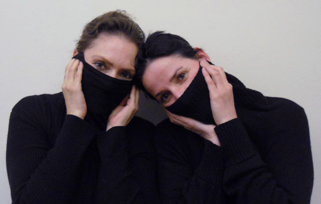 Das deutsche Künstlerduo "Stoll & Wachall"